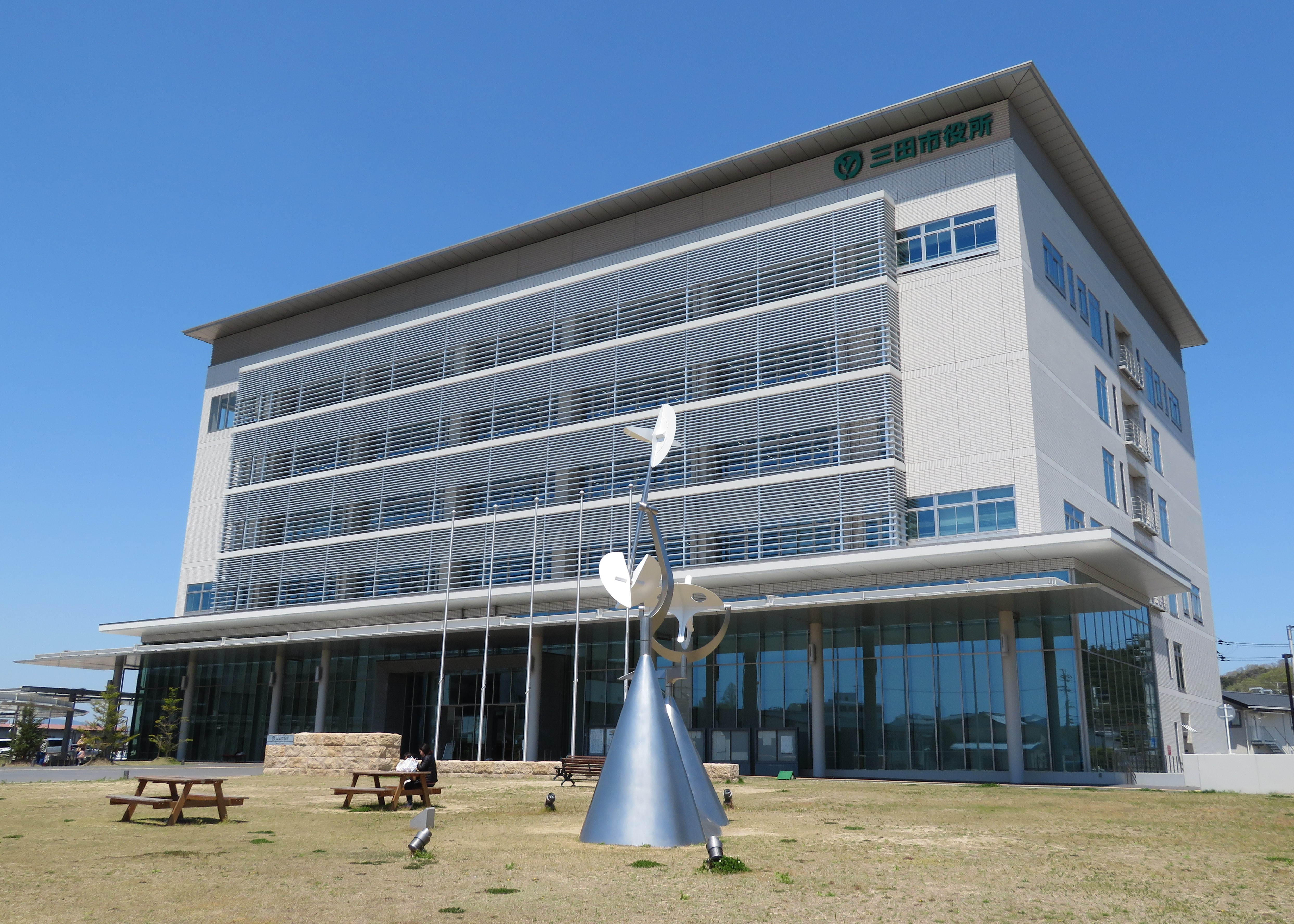 三田市役所本館